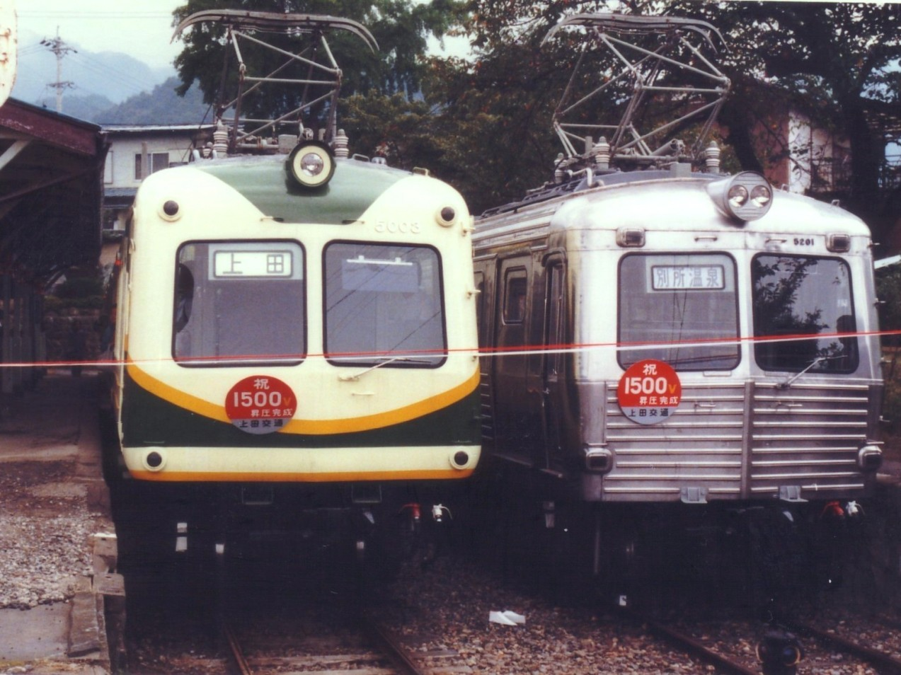 上田交通別所線（当時）別所温泉駅で出発式を待つデハ5000系電車のデハ5003号とデハ5200系電車のデハ5201号。1986年10月1日の同線の昇圧日の朝10時前(UTC+9)に投稿者が銀塩フィルムカメラで撮影したものを、2008年2月24日に投稿者がスキャンの上アップロード。両系列は既に当線からは引退している。またデハ5201号の停車している右側の2番線も現在はレールが外されている。